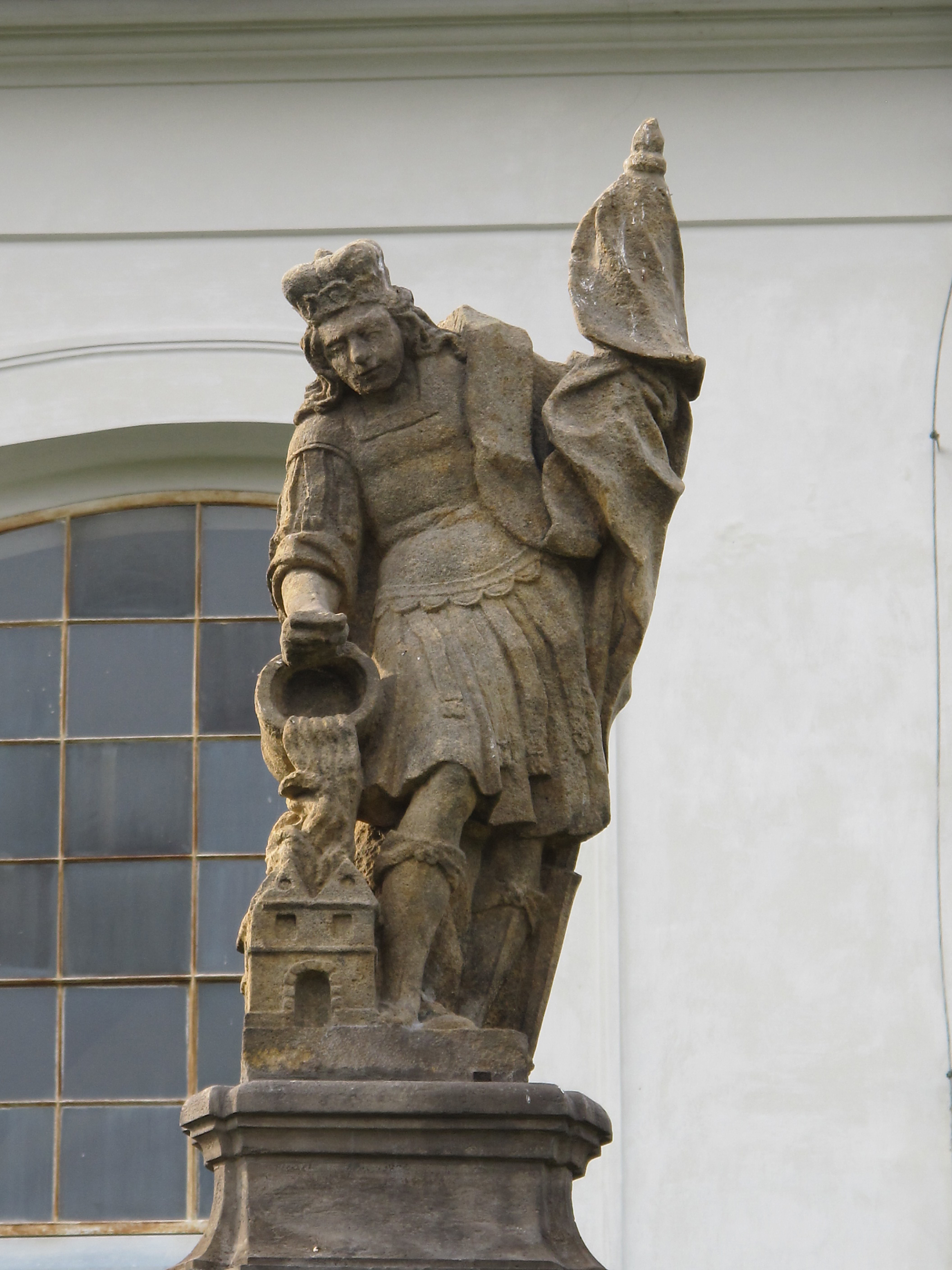 Socha sv. Floriána (Malé Březno), před kostelem sv. Evangelisty, Malé Březno